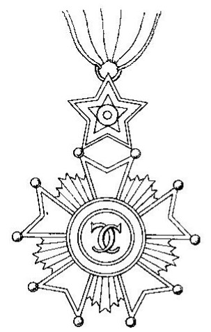 Order Kolumba